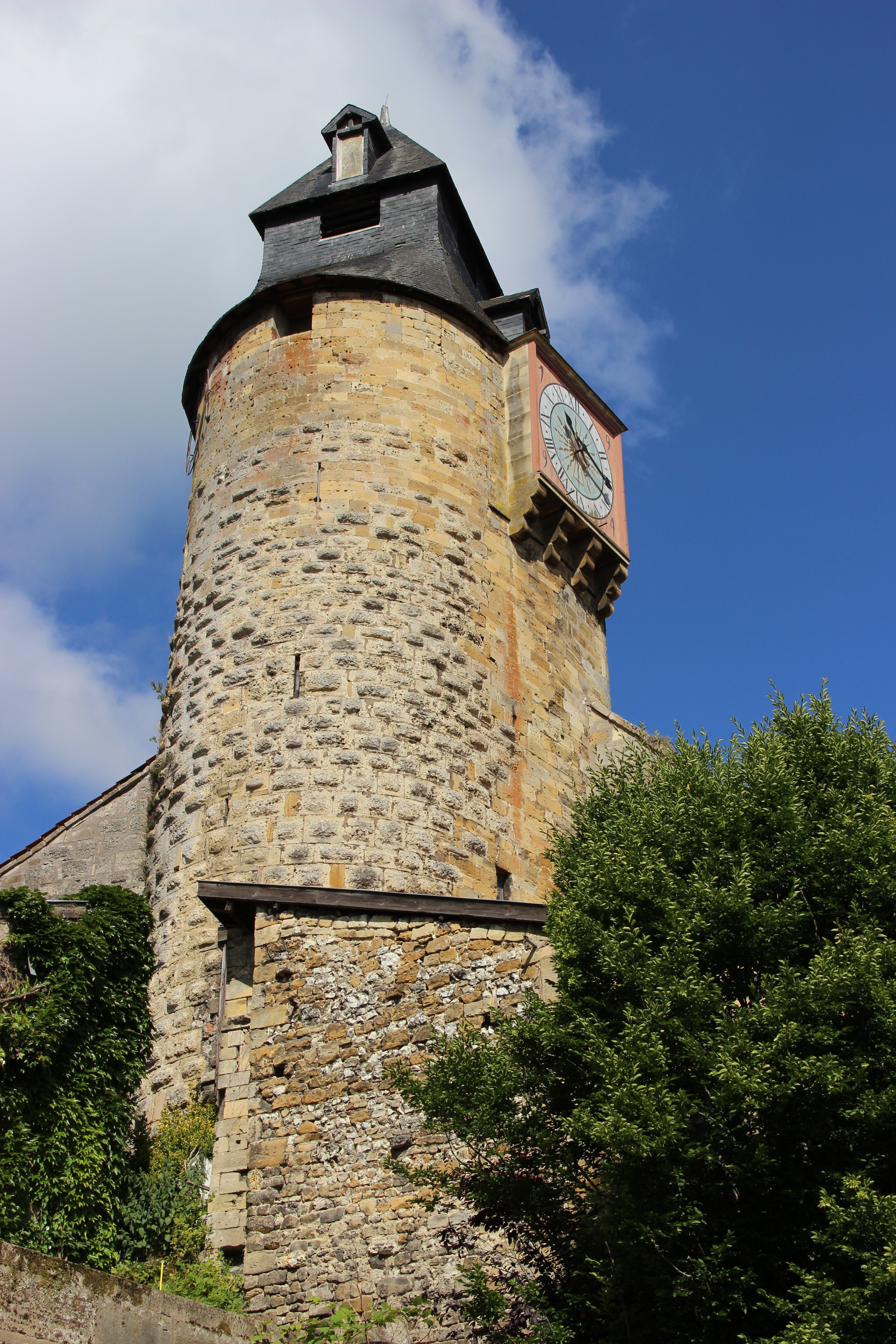 La Tour de l'Horloge